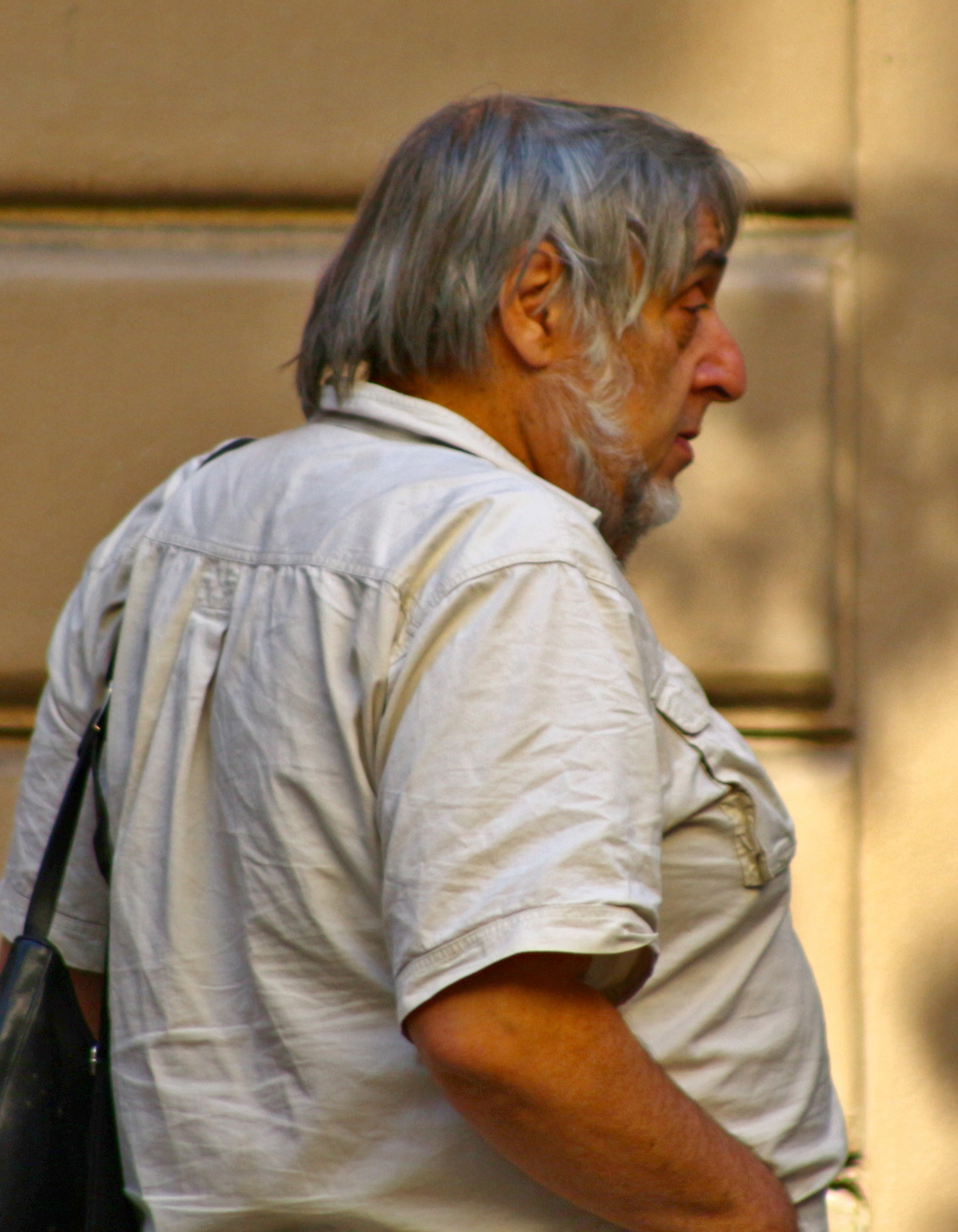 Jiří Hošek